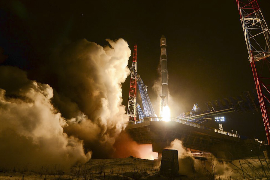 Воздушно-космические силы провели успешный пуск новой ракеты-носителя «Союз-2.1В» с космодрома Плесецк